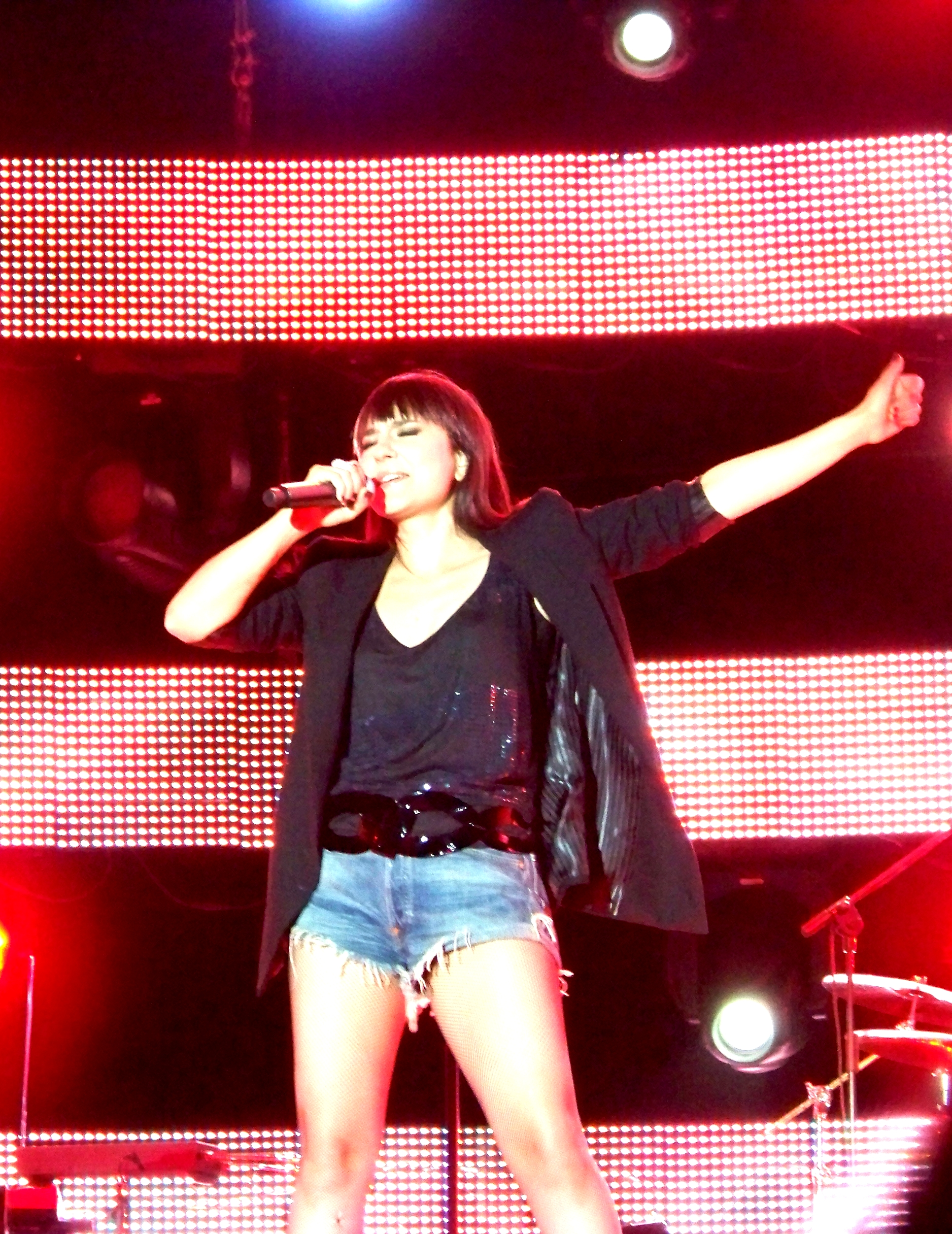 Amaral